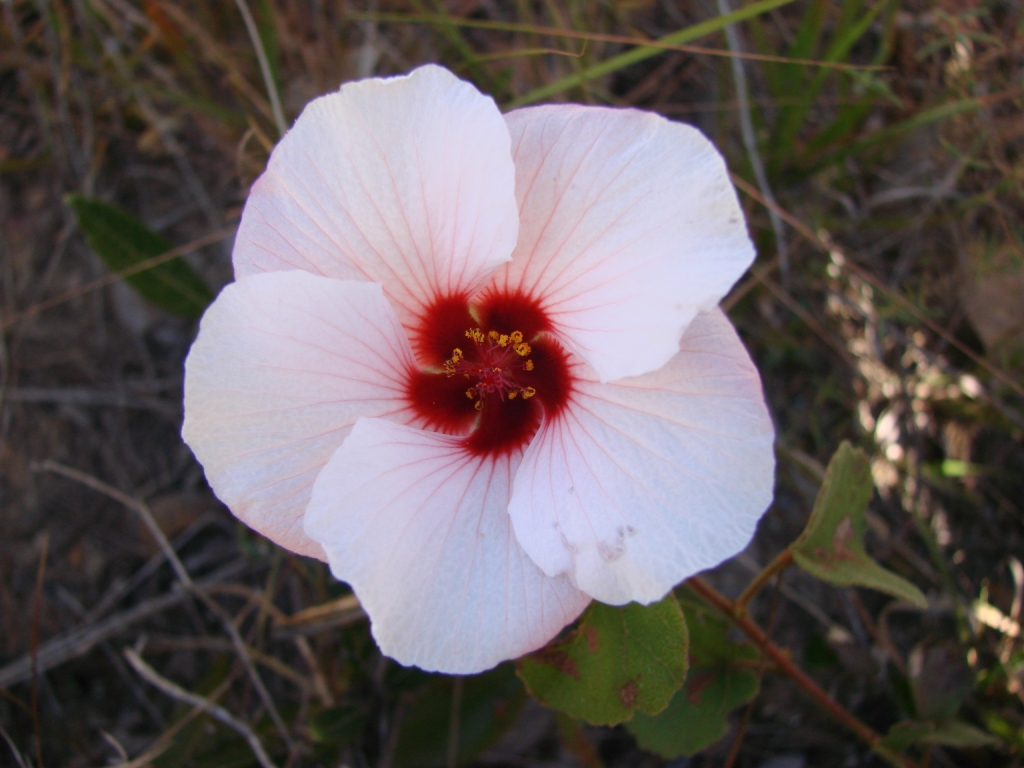 Peltaea polymorpha - MALVACEAE - Jardim Bot�nico de Bras�lia - DF - Brasil